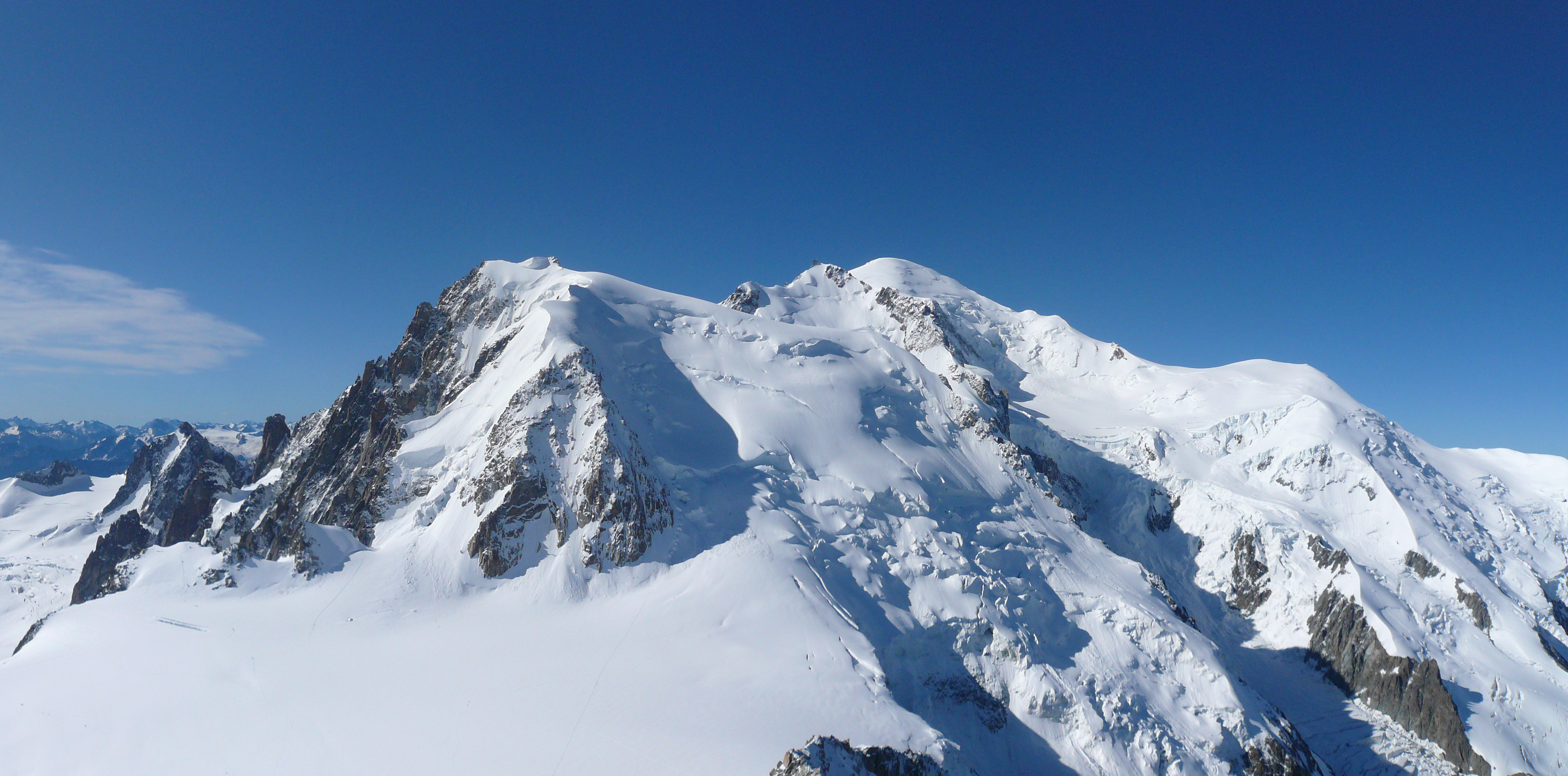 Panorama sur le massif du mont Blanc vu depuis l'aiguille du Midi. De gauche à droite : le mont Blanc du Tacul (4248 m), le mont Maudit (4465 m), le mont Blanc (4810 m) et le dôme du Goûter (4304 m). This image was created with Hugin